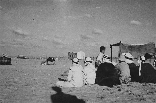 ביום העליה לנירים בנגב הבדואים השכנים באים לראות בבנין הנקודה החדשה , המוכתר עם מספר חברים באו לקדם את פניהם